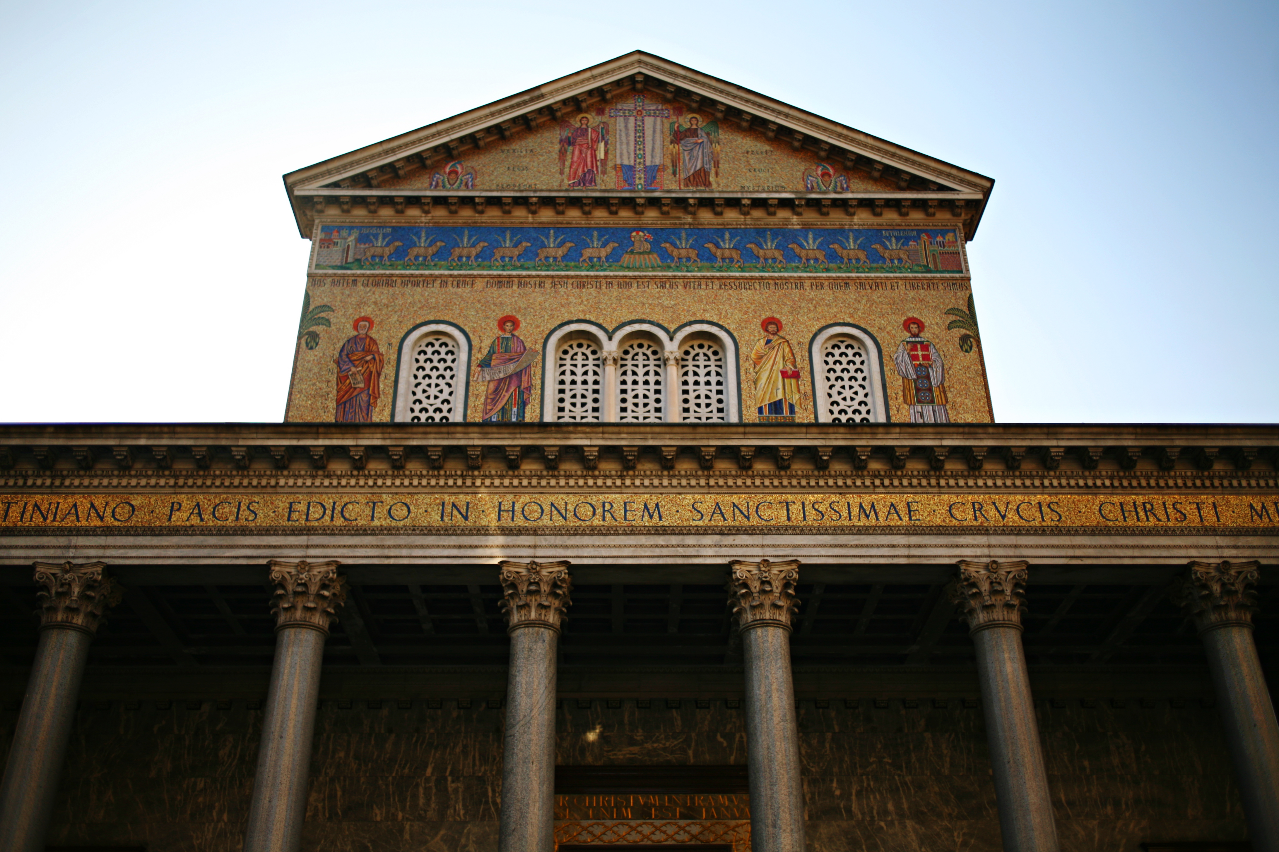 Particolare della facciata della chiesa di Santa Croce di Milano, dell'architetto Cecilio Arpesani costruita fra il 1913 e il 1917